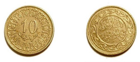 Pièce de 10 millimes - pièce de monnaie Tunisienne